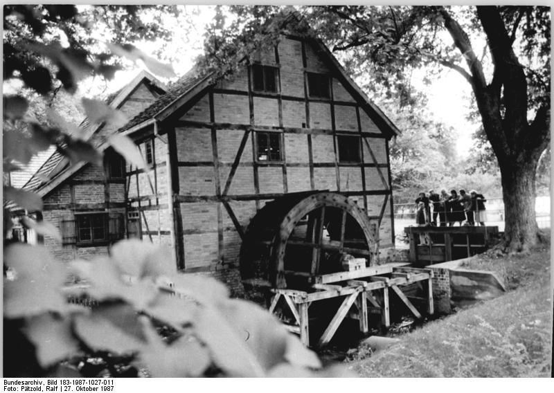 Schwerin, Technisches Museum, Schleifmühle ADN-ZB Pätzold-27.10.1987 Schwerin: Technisches Museum-Die Schweriner Schleifmühle, jüngstes technisches Museum der Bezirksstadt, vermittelt anhand des praktischen Beispiels Wissenwertes über die alte Technik der Steinschleiferei. Bei der Rekonstruktion in den Jahren 1983-85 bauten Zimmerleute des VEB Denkmalpflege Schwerin ein unterschlächtiges Wasserrad mit einem Durchmesser von 4, 20 Metern, wodurch die seit dem 18. Jahrhundert betriebene Steinschleiferei wieder möglich wurde. (siehe 10N) Im Obergeschoß des Gebäudes befindet sich eine umfangreiche Sammlung bearbeiteter und unbearbeiteter Steine. Das Museum, eine Außenstelle des Historischen Museums, ist in jedem Jahr vom 1. Dezember bis zum 1. April geschlossen.